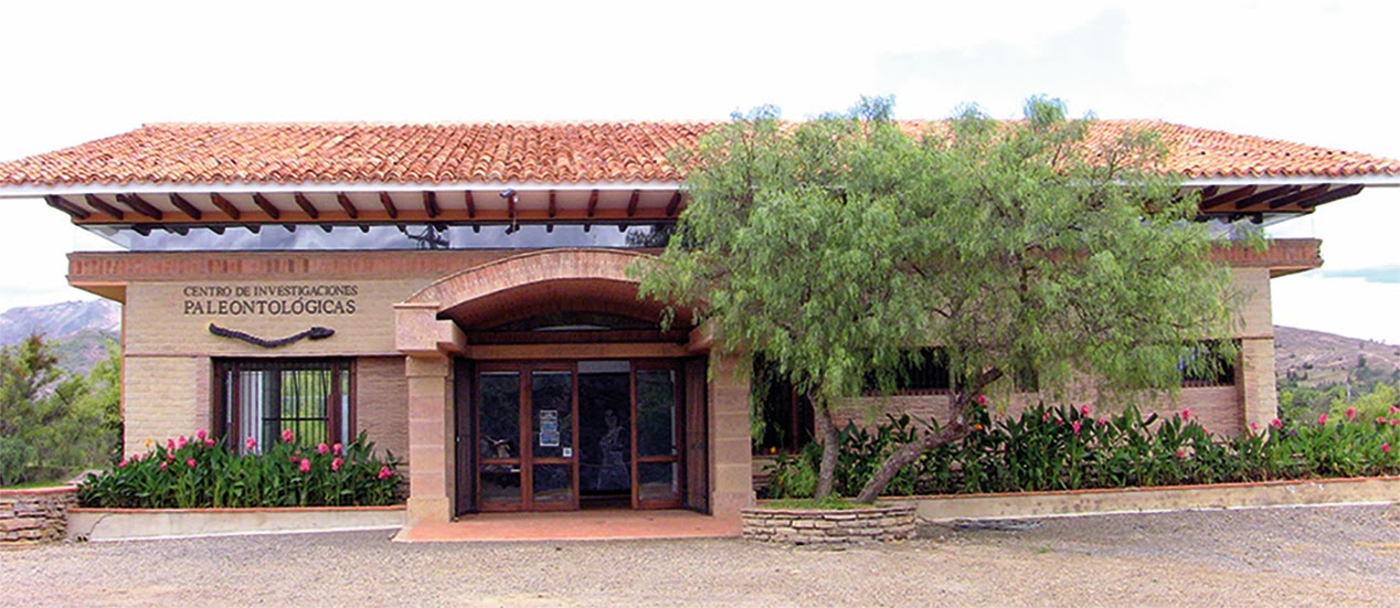 CIP Villa de Leyva